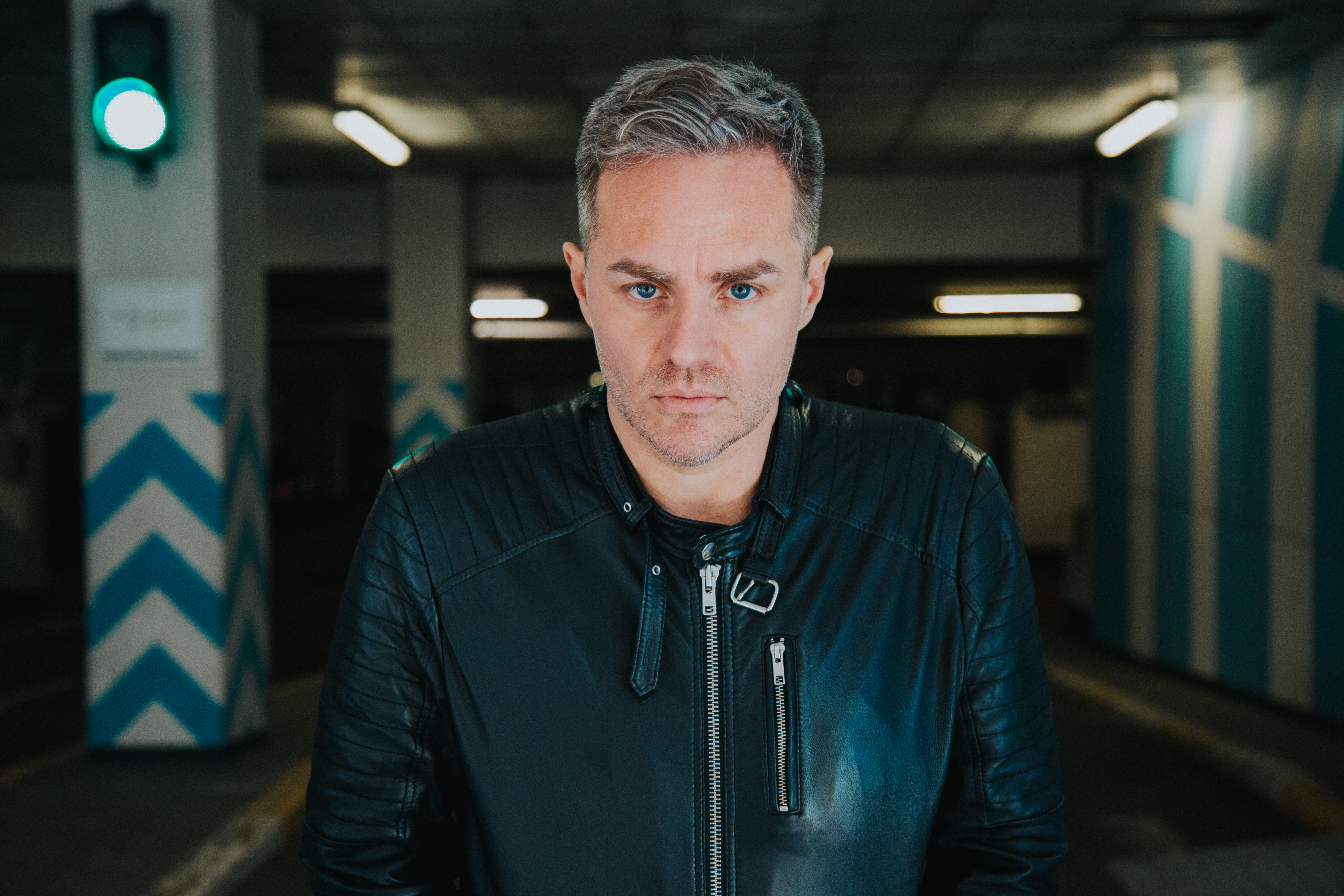 Peter Van de Veire